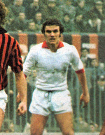 Milano, stadio San Siro. 12 gennaio 1975. Il centrocampista italiano Walter De Vecchi in azione al Varese, nel corso della trasferta persa sul campo del Milan (4-0) e valevole per la 13ª giornata del campionato italiano di Serie A 1974-75.